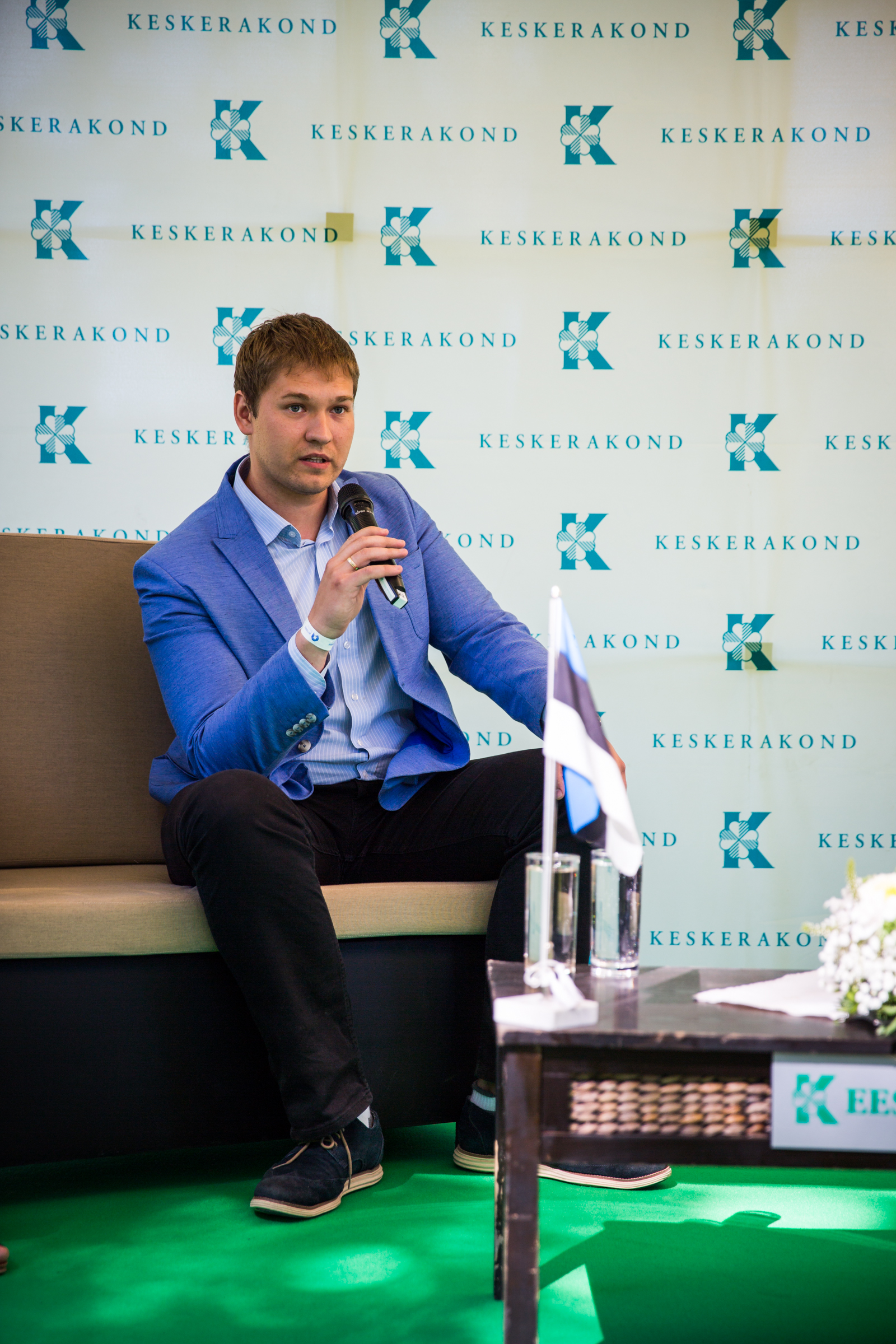 Artjom Suvorov arutlemas teemal "ETV+ ehk milline on Eesti lõimumispoliitika tulevik?"